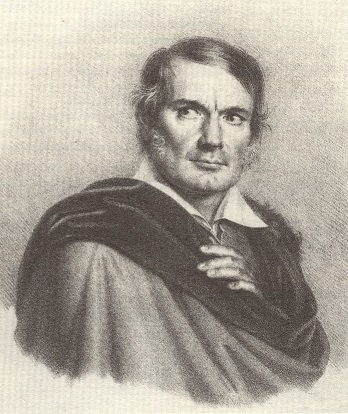 Antonio Morri (1793-1868), lessicografo, glottologo e letterato italiano.